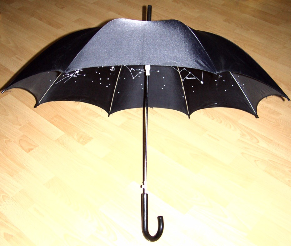 Regenschirm. regnhlíf. paraguas. parapluie. umbrella.